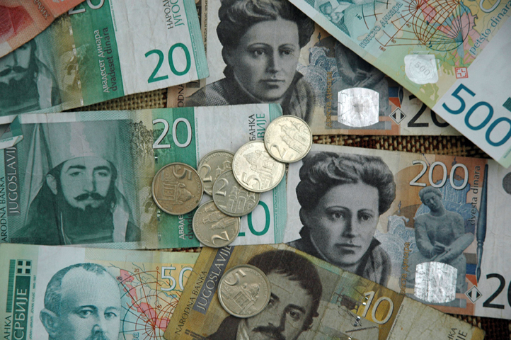 Serbischer Dinar